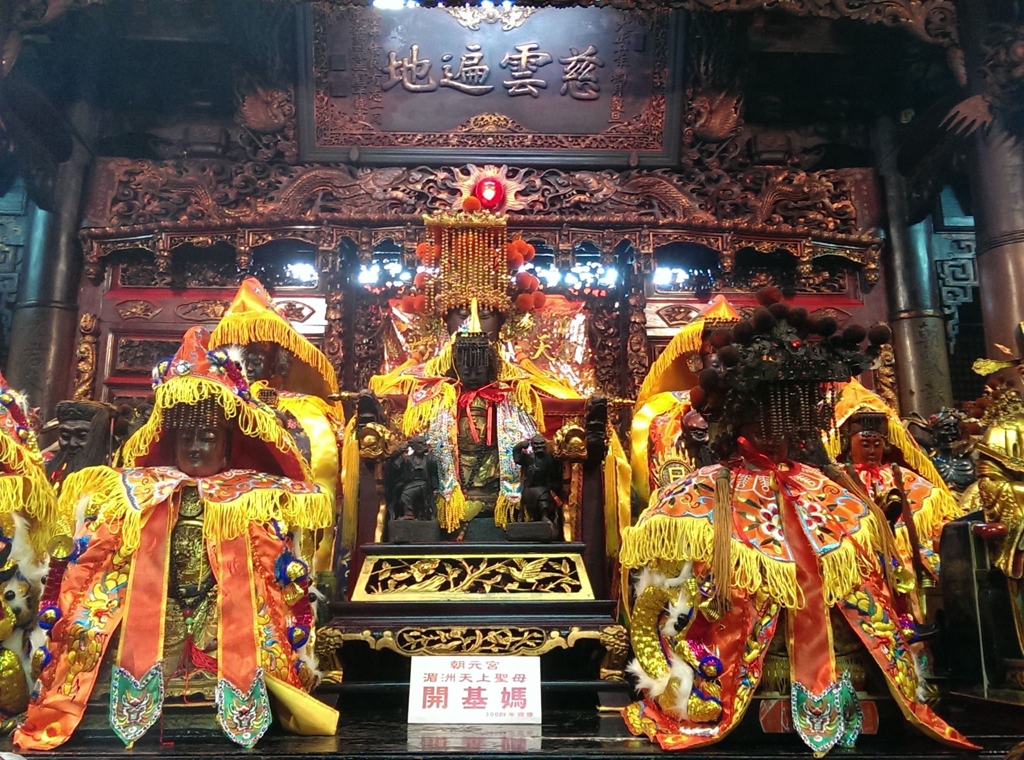 朝元宮內殿